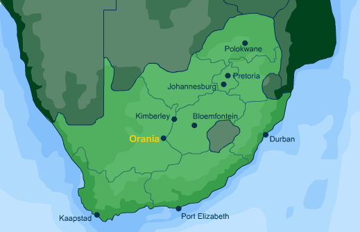 To be used with reference to Orania only. Licensing Catégorie:Carte d'Afrique